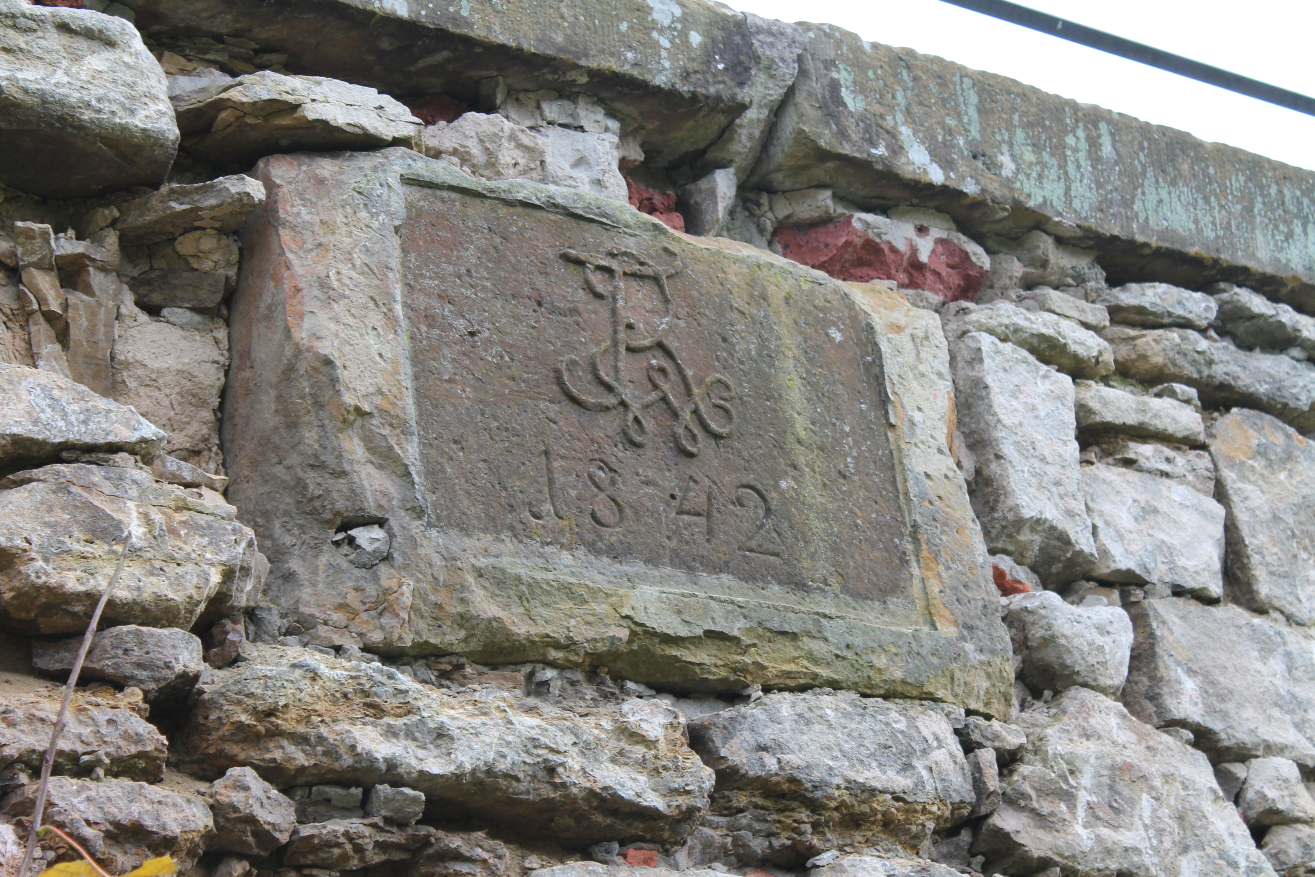 Bielefeld, Baudenkmal 219, Detail